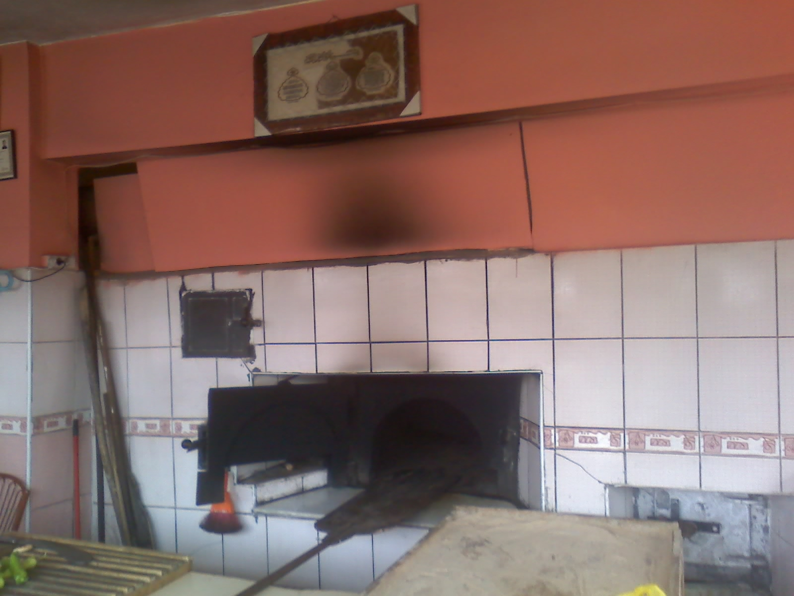 Kıymalı pide fırını.